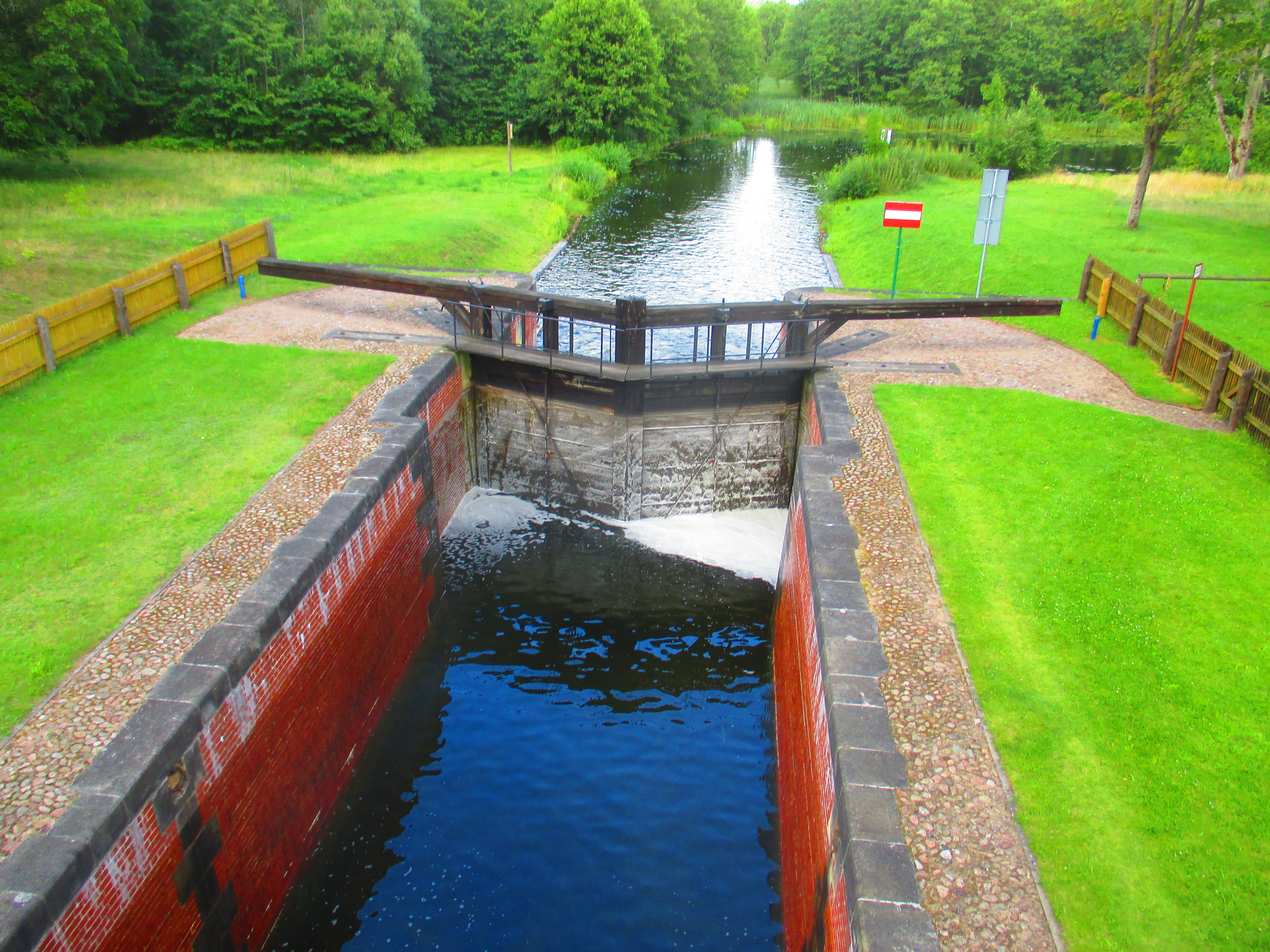 Śluza Gorczyca, widok na dolne wrota